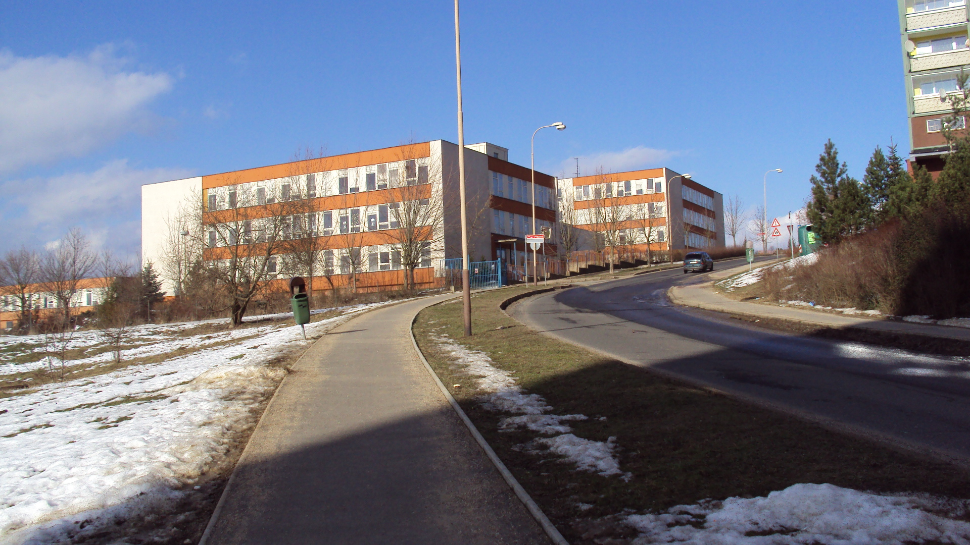 Škola ZŠ Šluknovská zdáli